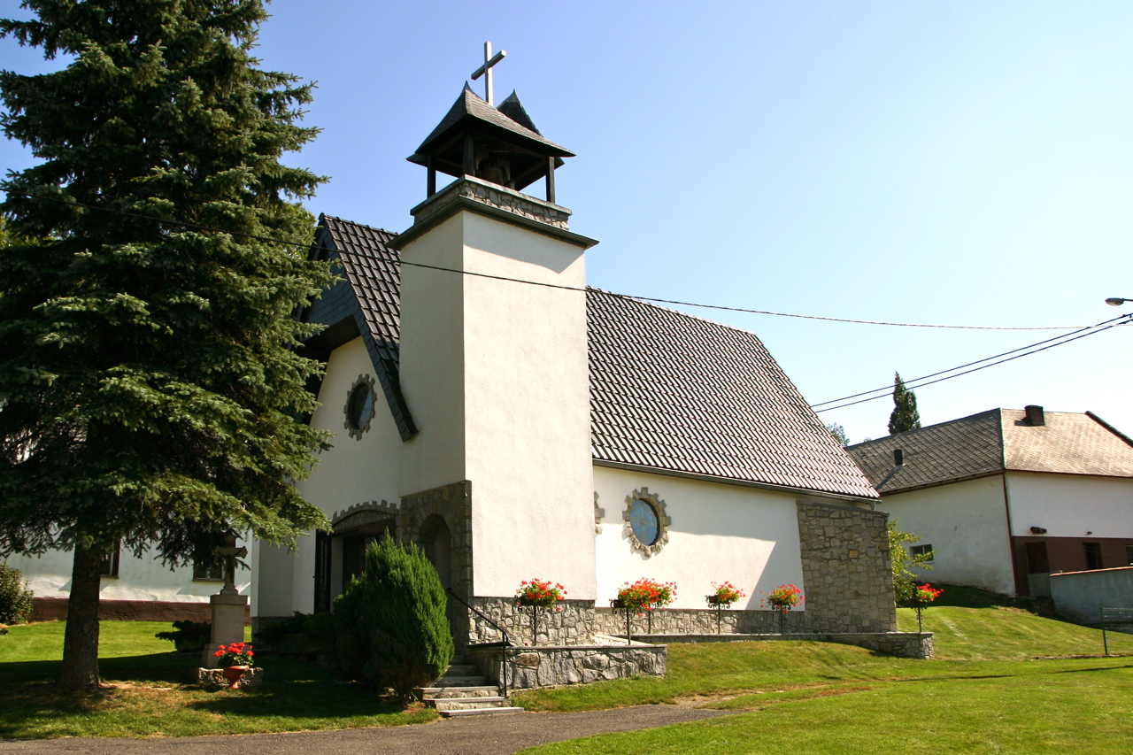 Browiniec Polski (dodatkowa nazwa w j. niem. Probnitz) – wieś w Polsce położona w województwie opolskim, w powiecie prudnickim, w gminie Biała.